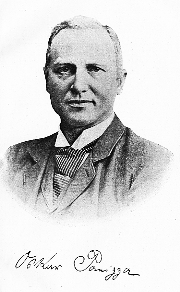 Fotografie von Oskar Panizza mit einem Faksimile seiner Unterschrift.